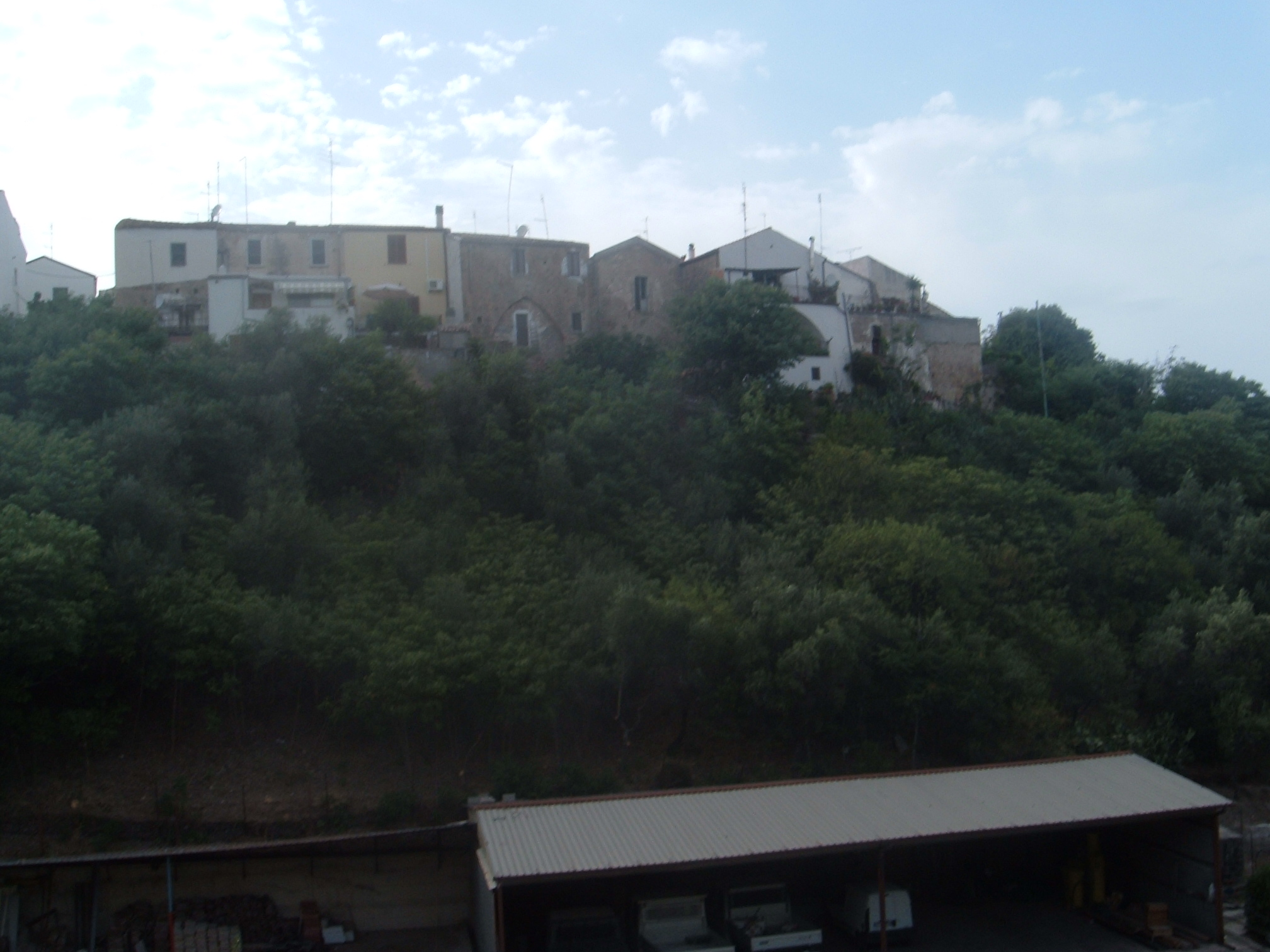 panorama del Borgo vecchio di Campomarino